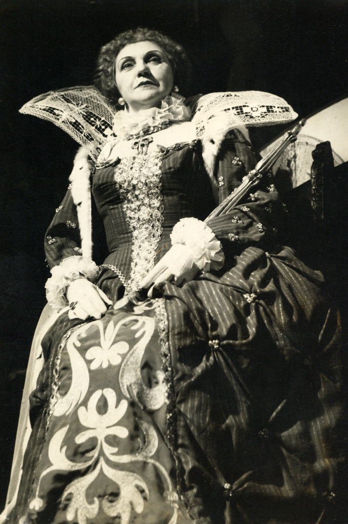 Ferdinand Bruckner, Elizabeta Angleška, Drama SNG v Ljubljani. Na fotografiji: Mira Danilova (Elizabeta Angleška).